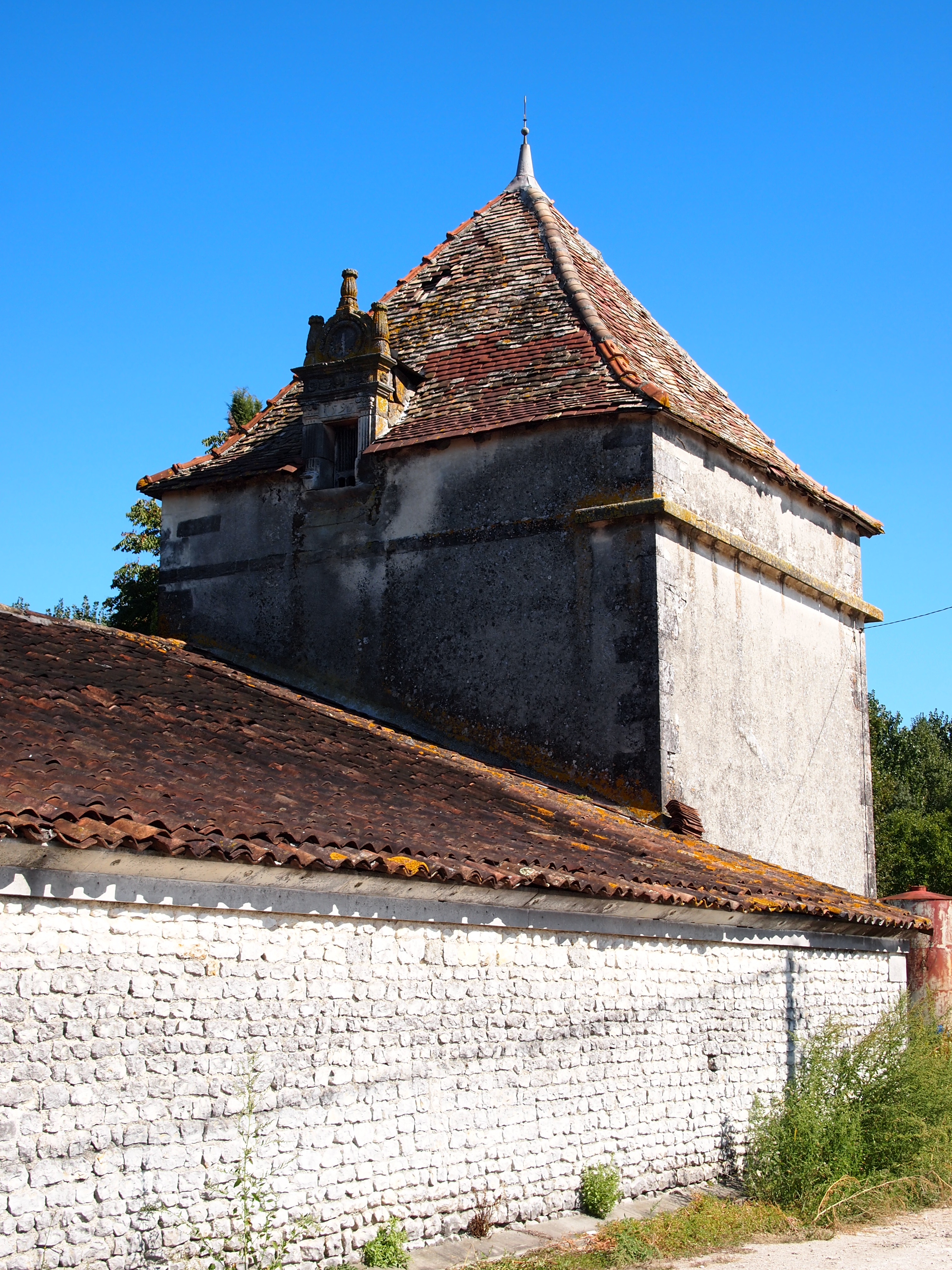 Pigeonnier du logis de Beaulieu à Germignac, en Charente-Maritime, daté de 1595.